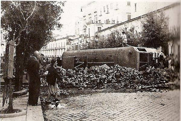 Napoli - Le Quattro Giornate : blocco stradale in via Santa Teresa degli Scalzi. Autore della foto sconosciuto.